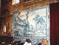 Convento de São Gonçalo, freguesia da Sé, cidade e concelho de Angra do Heroísmo, ilha Terceira, Açores: pormenor dos paineis de azulejos.